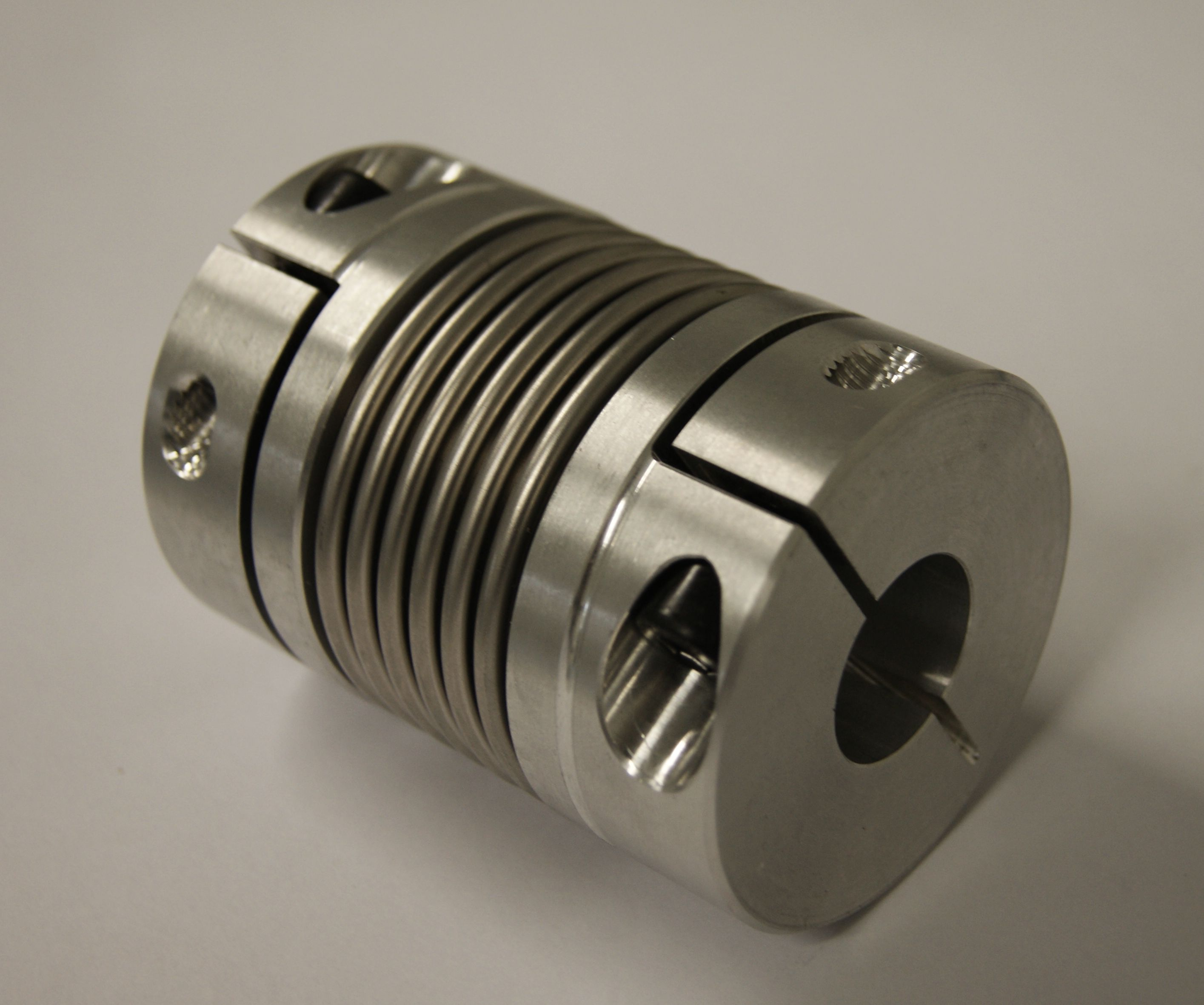 Metallbalgkupplung als Ausgleichskupplung